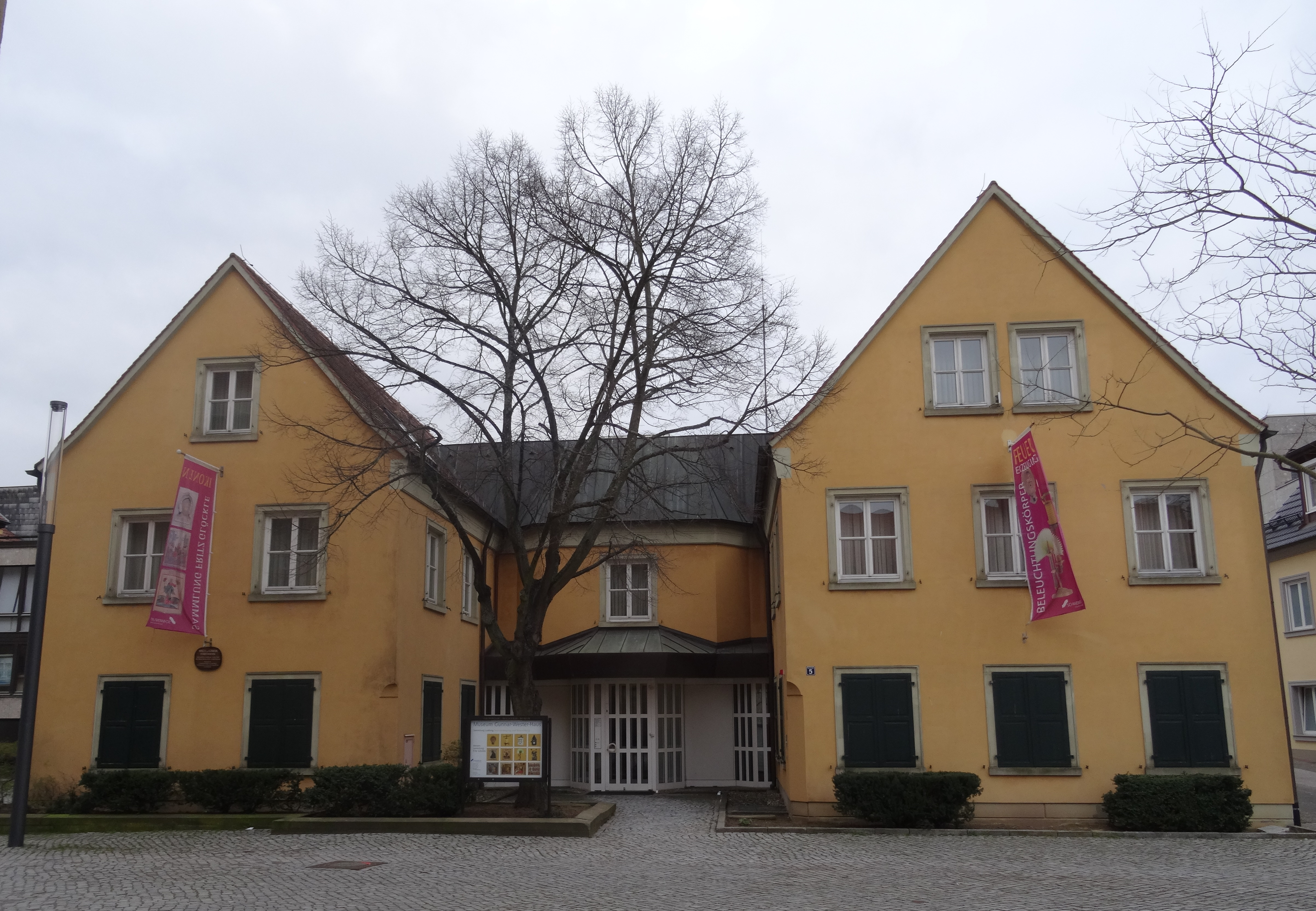 Museum Gunnar-Wester-Haus. Martin-Luther-Platz 3; Schweinfurt